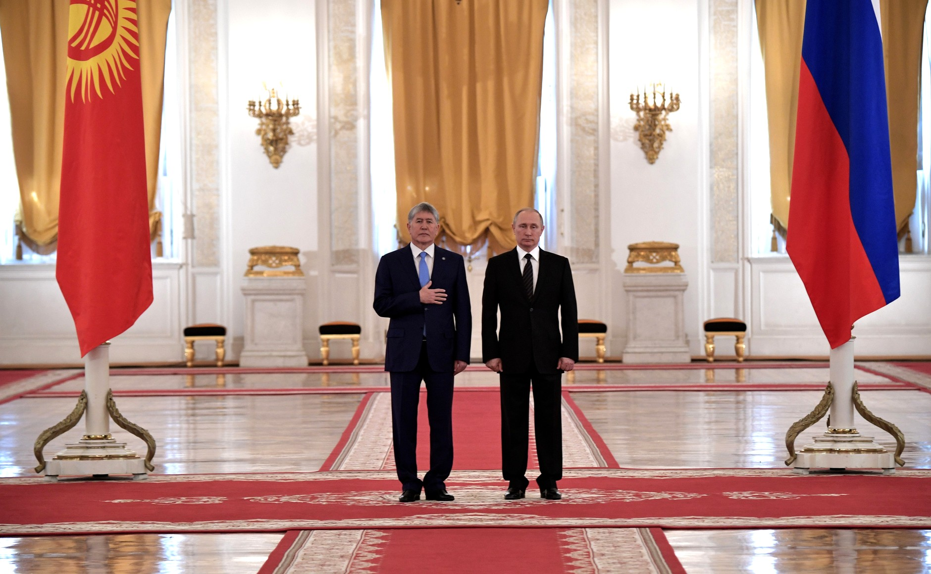 C Президентом Киргизии Алмазбеком Атамбаевым